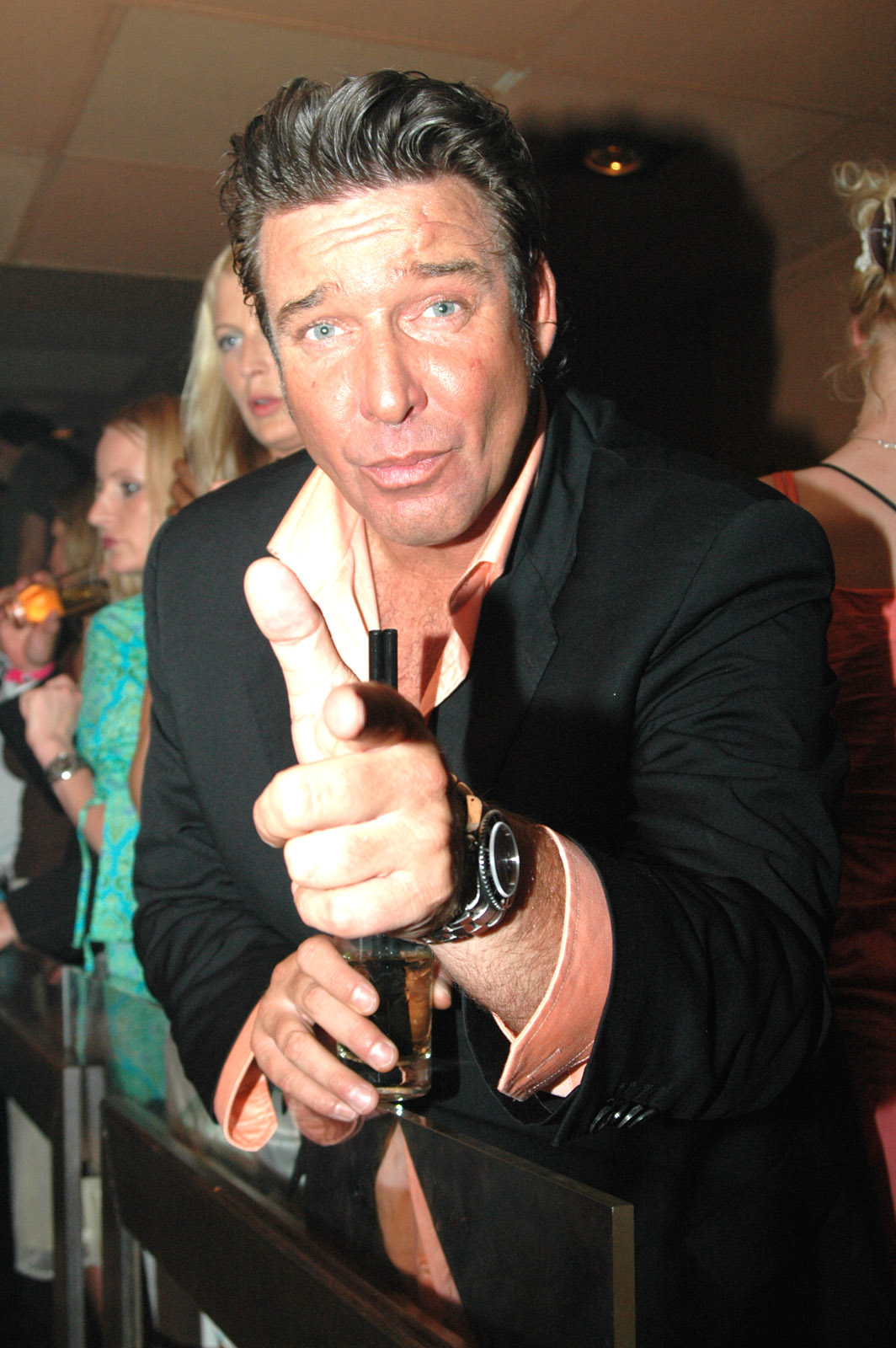 Michael Ammer am 25.05.2005 bei der Darmstädter Modelnacht im "Nachtcafe"